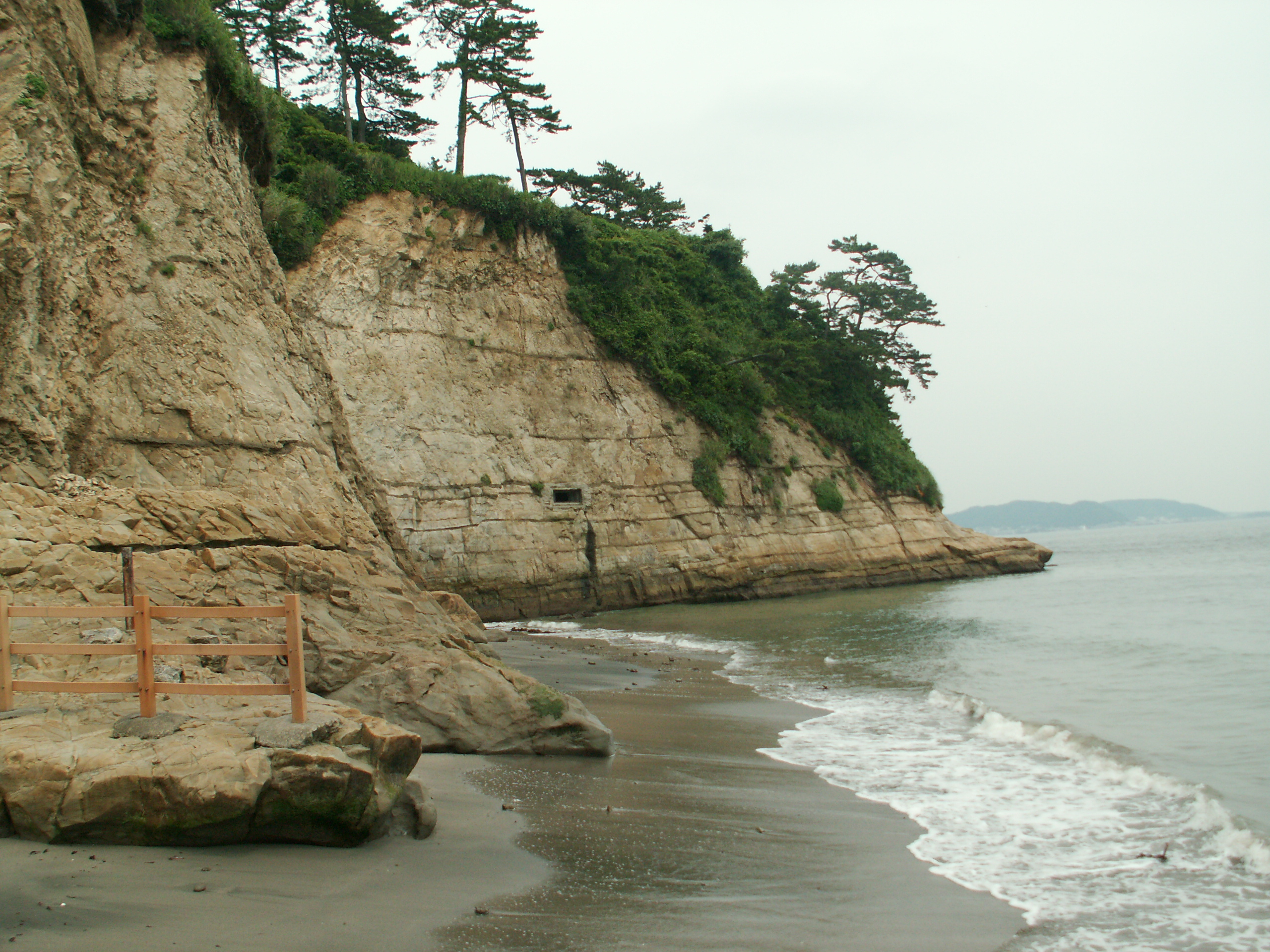 稲村ヶ崎突端部。岬の中央部あたりにある横穴は第140師団が構築した横穴陣地と伝わる。